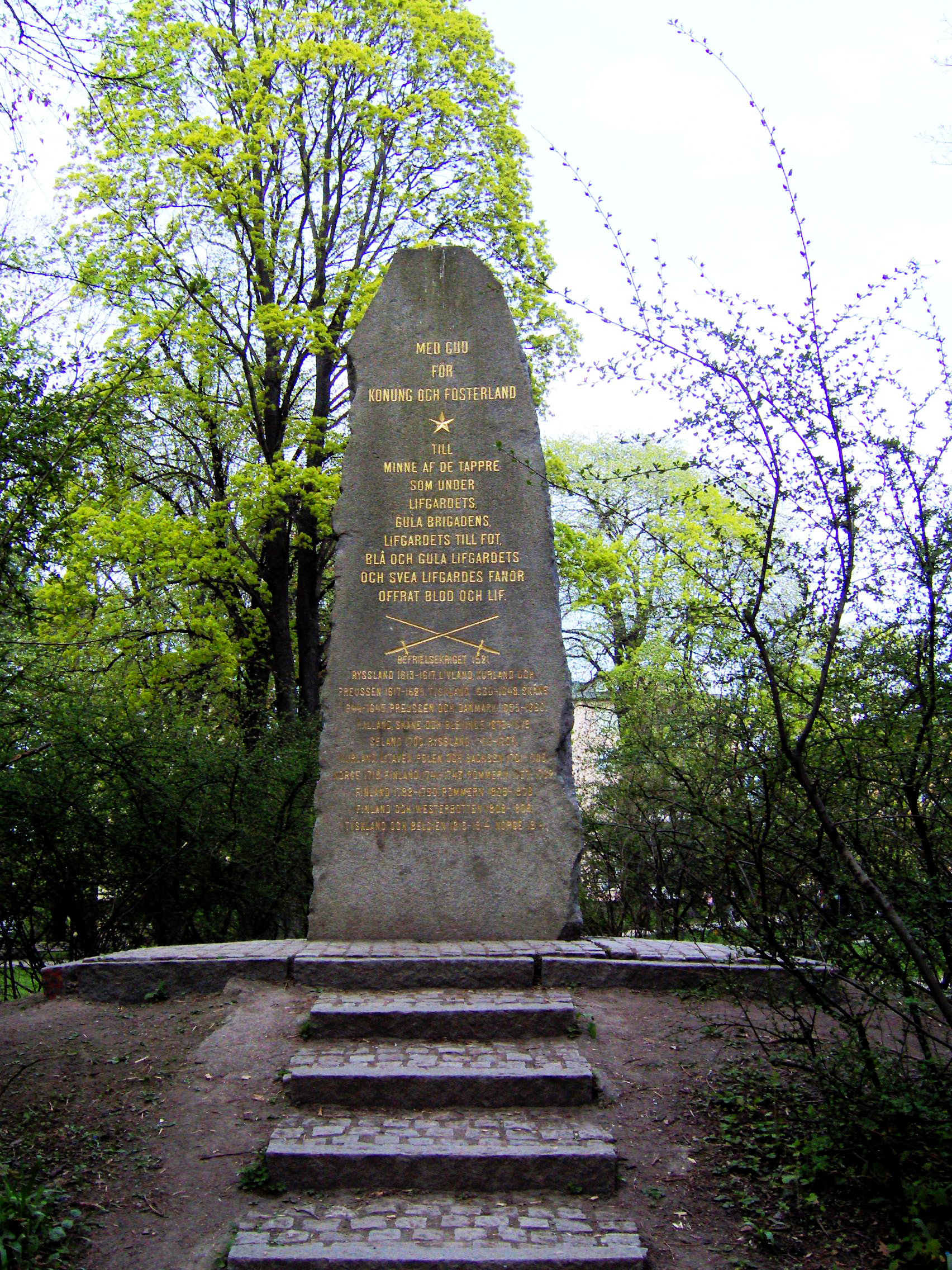 Svea Livgardes minnesten i Gustav Adolfsparken, Stockholm, Sverige.